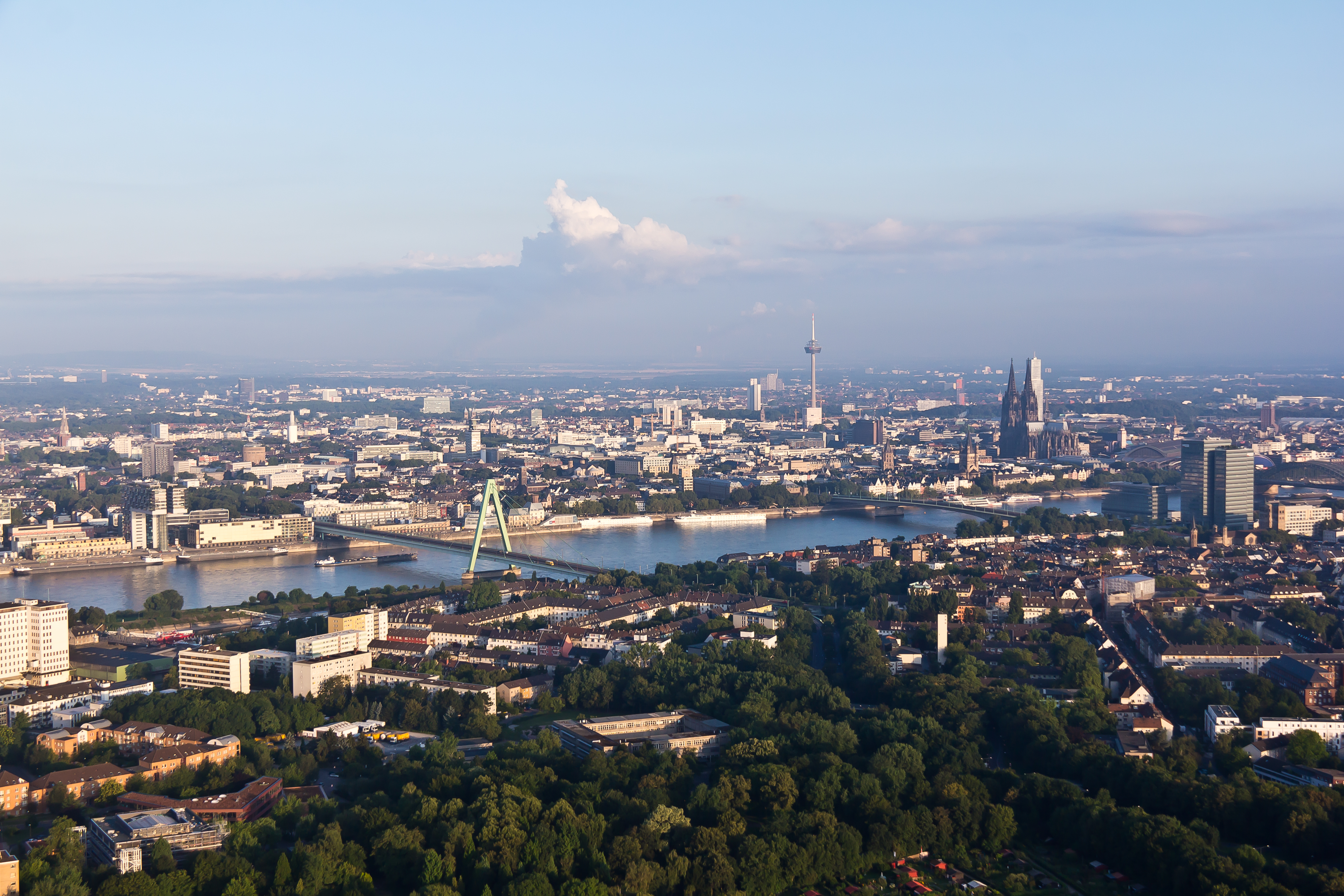 Ballonfahrt über Köln - Deutzer Hafen, Rhein, Rheinauhafen, Altstadt